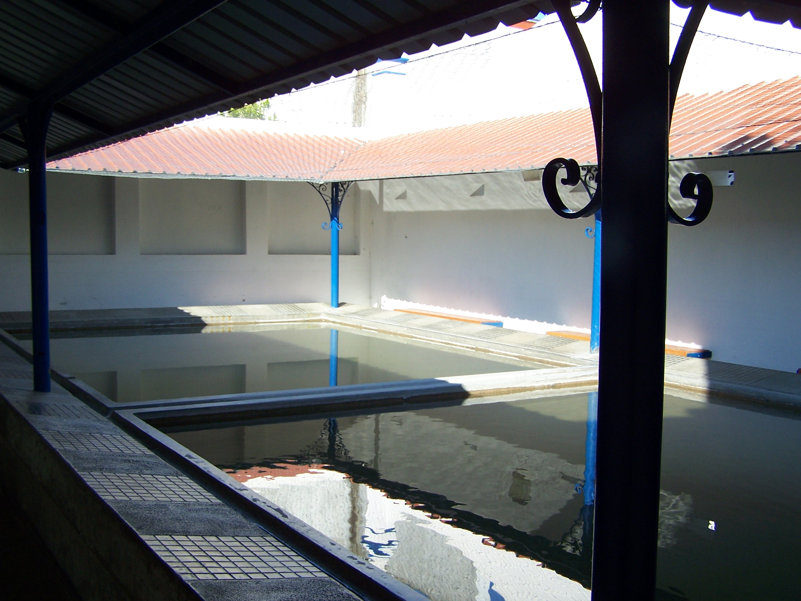 Cabeção - Tanque das lavadeiras